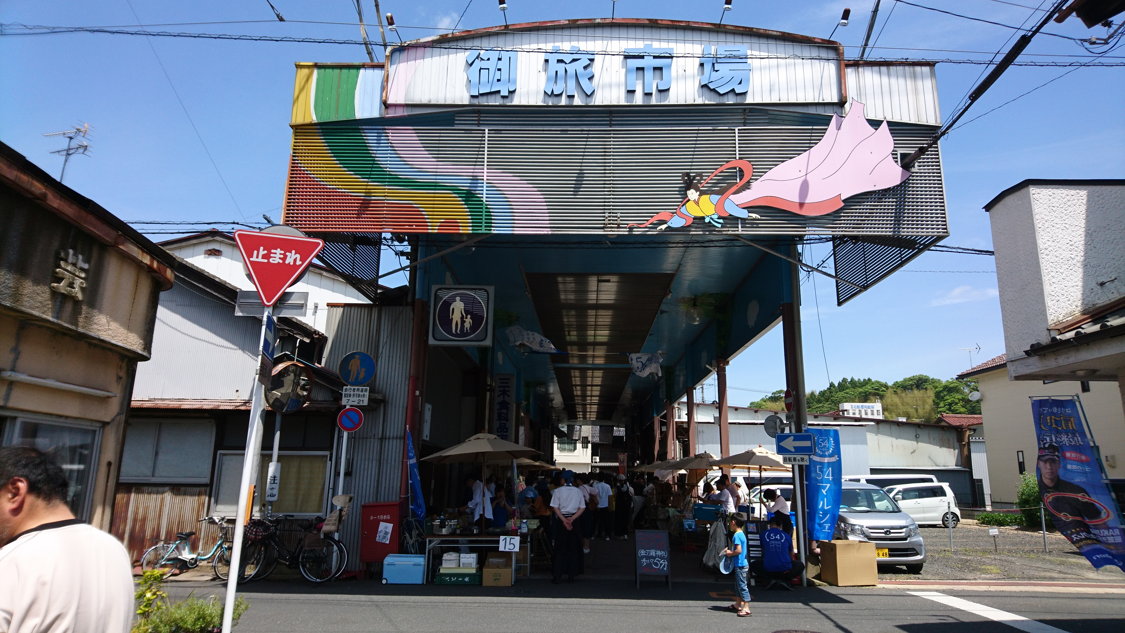 御旅市場で開催された京丹後54マルシェ